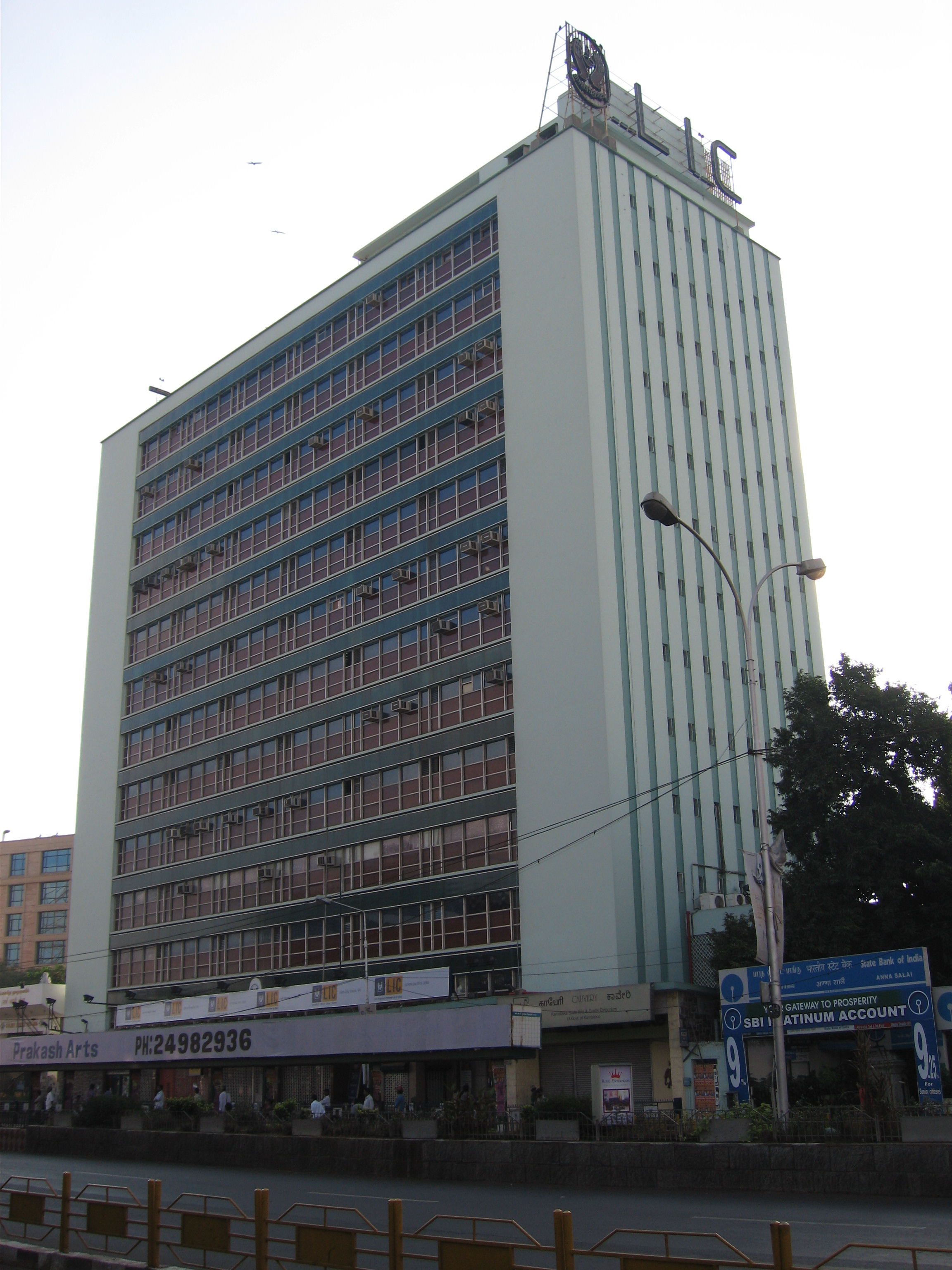 LIC Building, Anna Salai, Chennai